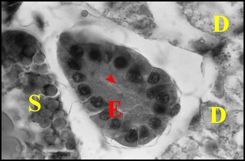 Autre Ilôt de tissu endocrinoïde chez un mâle de Mastophora cornigera